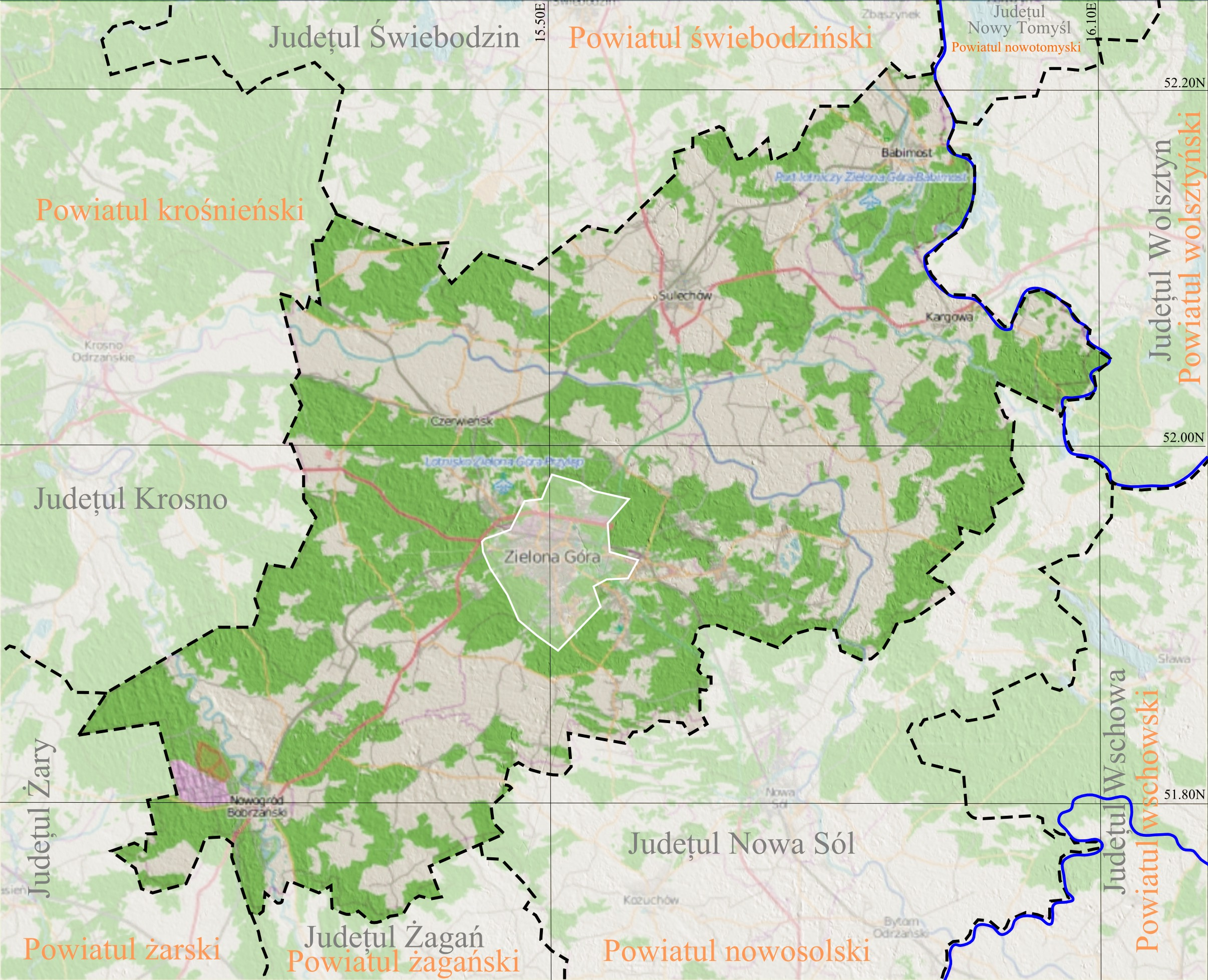 Harta de localizare a Judeţului Zielona Góra din Voievodatul Poloniei, Lubusz. Coordonate: Top: 52.25 Bottom: 51.70 Left: 15.00 Right: 16.10